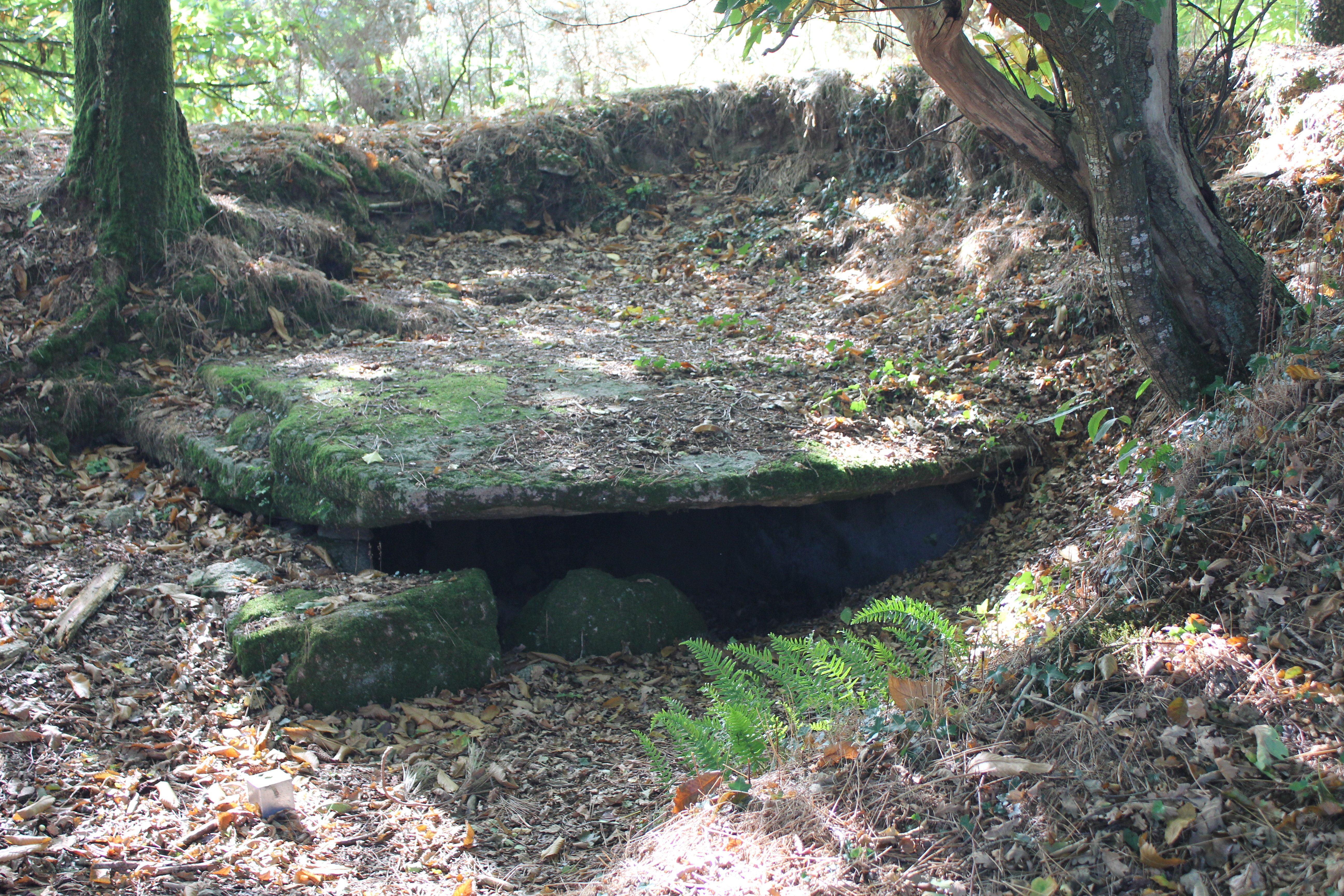 Dolmen de Kergonfalz, vue de l'entrée .